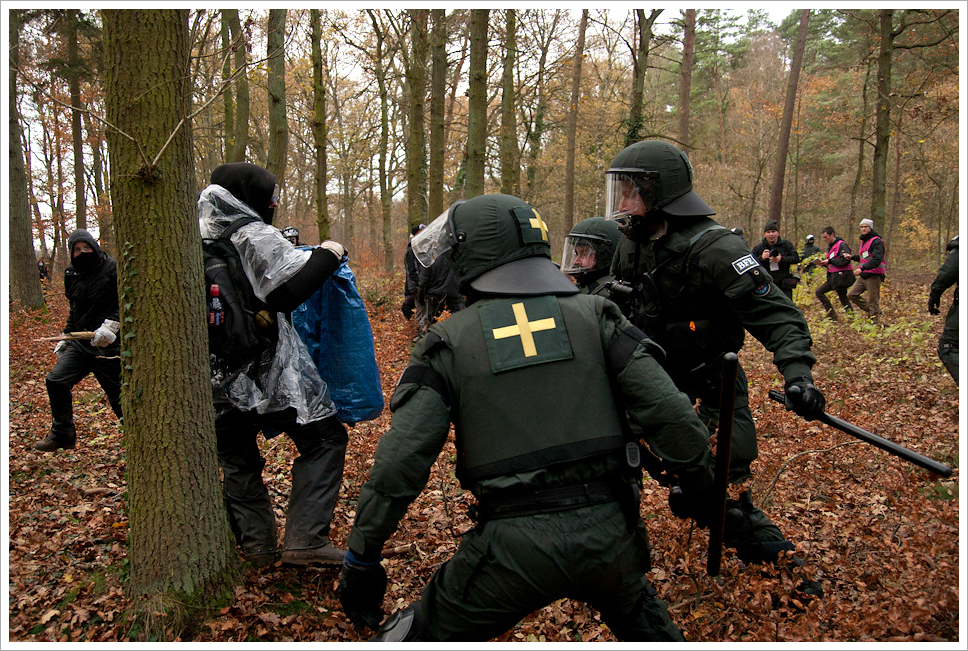 Castor 2011: Polizisten der BFE mit Tonfa